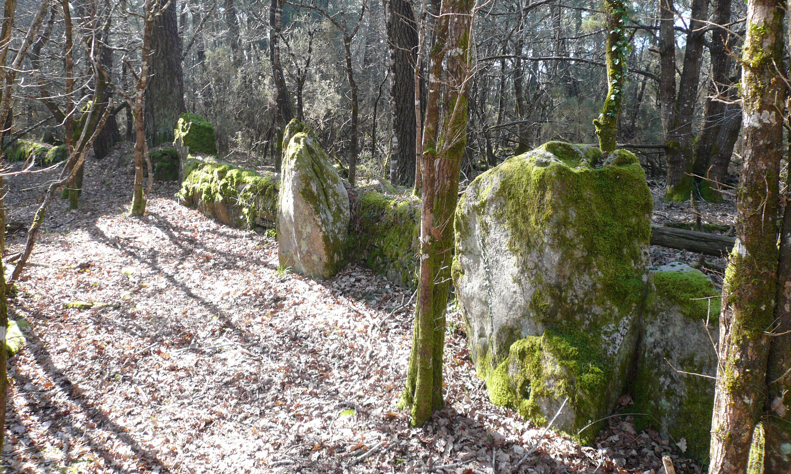 Alignement de menhirs, vestiges du cromlech nord de Kerlescan, commune de Carnac, Morbihan, Bretagne, France.